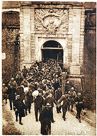 Porte de la citadelle de Saint-Martin-de-ré. La sortie des condamnés au bagne pour leur embarquement vers Saint-Laurent-du-Maroni. Carte Postale ancienne (début XXeme) de Ramuntcho